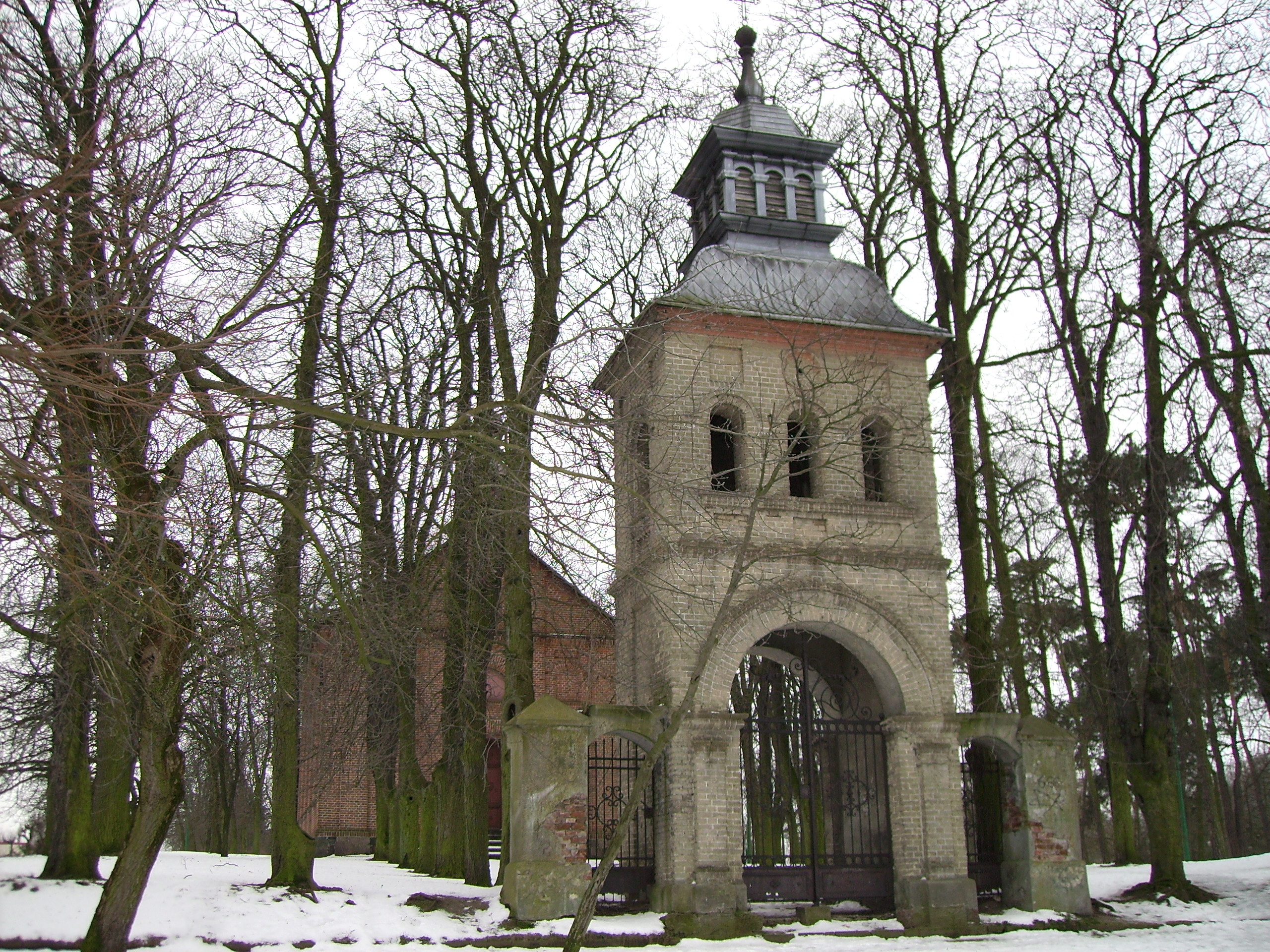 Dzwonnica kościoła ewangelicko-augsburskiego w Poddębicach. W głębi zbór ewangelicki